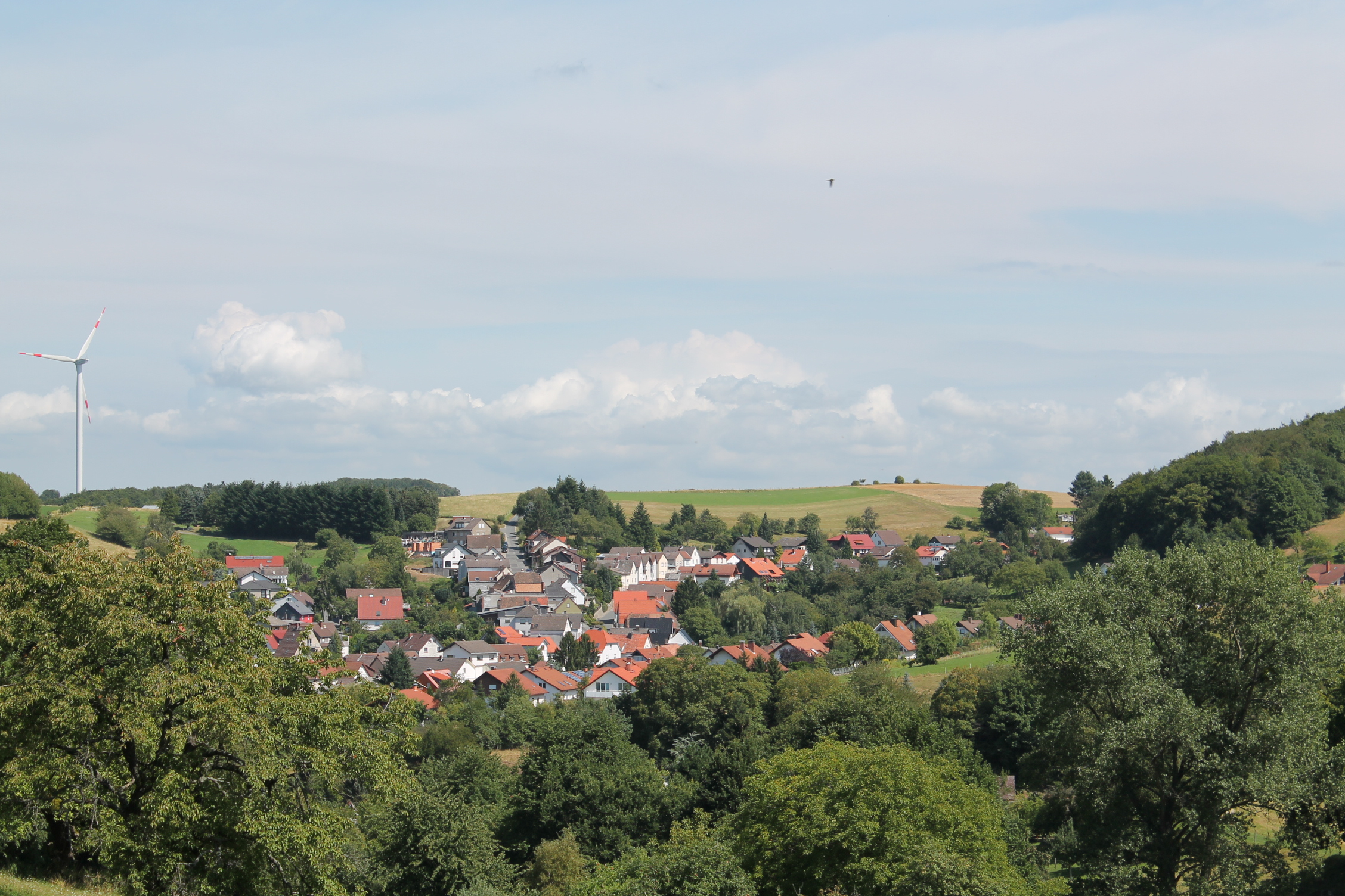 Blick von Süden auf Ober-Beerbach, Seeheim-Jugenheim, Hessen